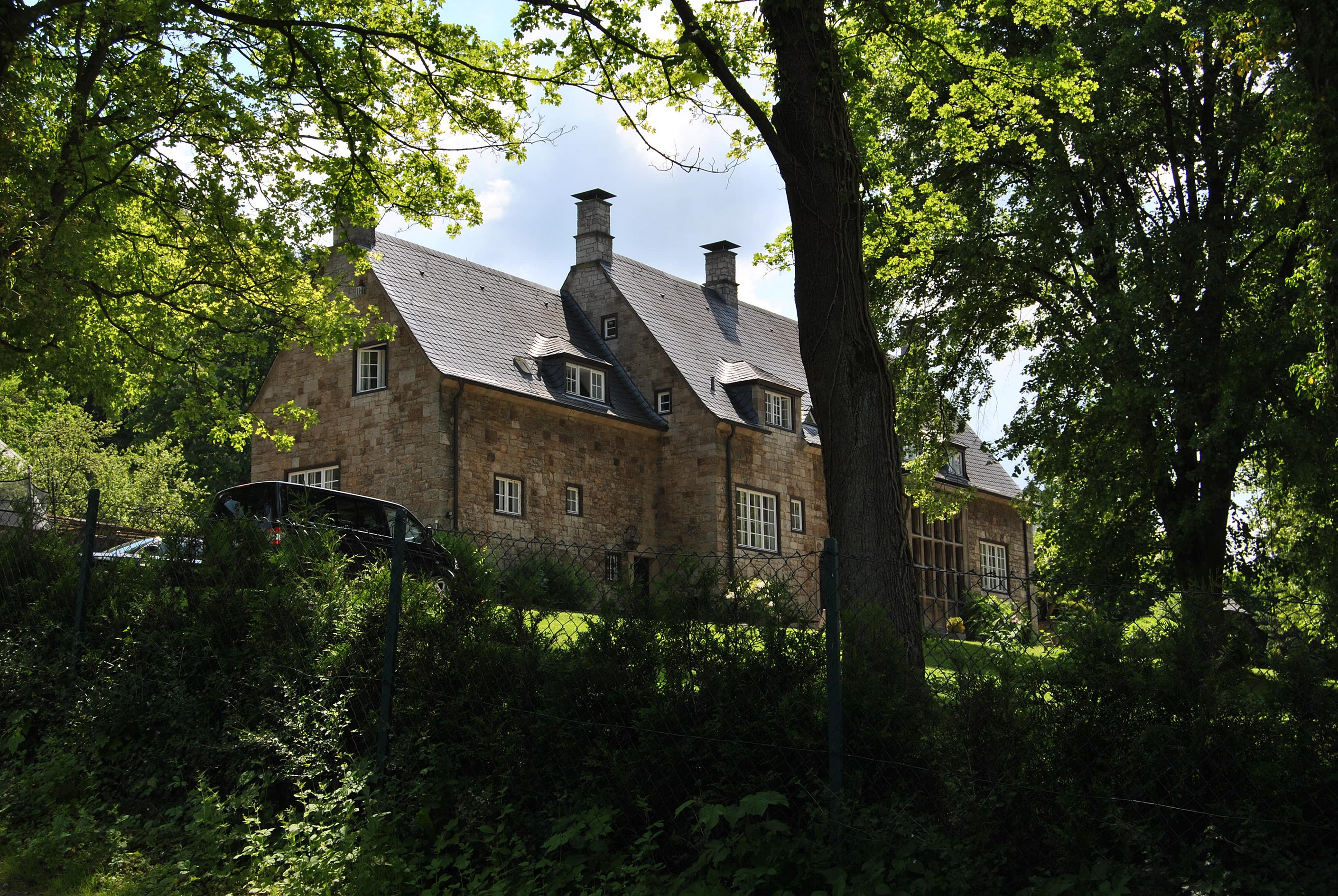 Marsberg (Nordrhein-Westfalen) – Niedermarsberg – Villa de Vries, Grüner Weg 17 This image shows a heritage building in Germany, located in the North Rhine-Westphalian city Marsberg (no. 61). This photograph was taken with a Nikon D3000